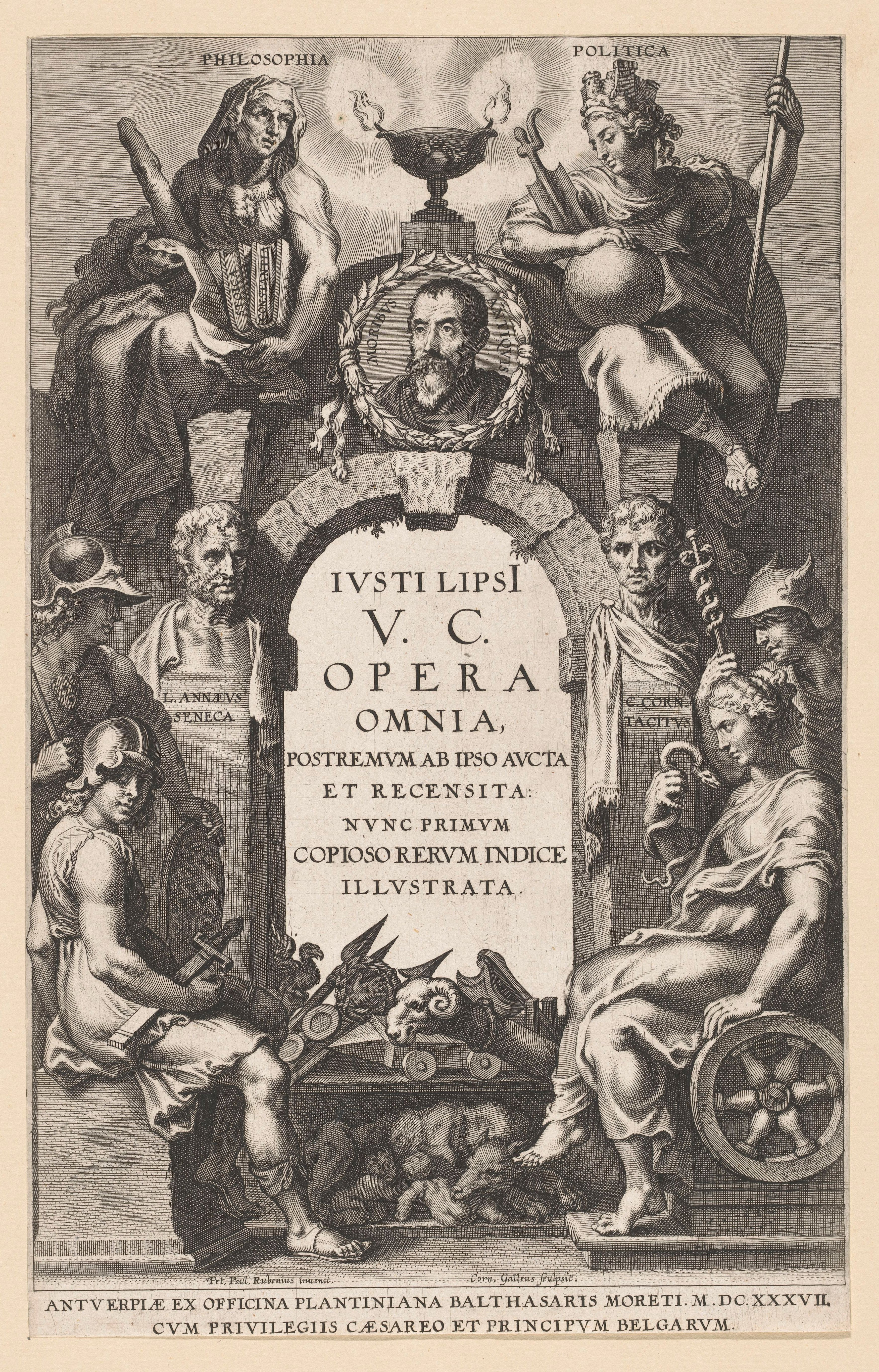 IdentificatieTitel(s): Allegorische titelpagina met stenen boog met een medaillonportret van Justus LipsiusTitelpagina voor: J. Lipsius, Opera omnia, Antwerpen: 1637Objecttype: prent titelpagina Objectnummer: RP-P-OB-6956Catalogusreferentie: Judson&van de Velde 73-2(2)Opschriften / Merken: verzamelaarsmerk, verso, gestempeld: Lugt 240Omschrijving: Op een stenen boog is een medaillonportret van de schrijver Justus Lipsius geplaatst. Aan weerszijden verbeelden de personificaties van de Filosofie en de Politiek de hoofdOnderwerpen binnen zijn oeuvre. Naast de boog twee portretbustes van antieke auteurs die Lipsius heeft geëditeerd: Seneca en Tacitus. Ernaast Minerva en Mercurius en de zittende personificaties van Deugd (links) en Voorzichtigheid (rechts). Proefdruk van een titelpagina voor Lipsius' verzamelde werken.VervaardigingVervaardiger: prentmaker: Cornelis Galle (I) (vermeld op object)naar ontwerp van: Peter Paul Rubens (vermeld op object)uitgever: Balthasar Moretus (I) (vermeld op object)uitgever: Officina Plantiniana (vermeld op object)verlener van privilege: Ferdinand II (Duits keizer) (vermeld op object)Plaats vervaardiging: prentmaker: Zuidelijke Nederlandenuitgever: Antwerpenuitgever: AntwerpenDatering: 1637Fysieke kenmerken: gravureMateriaal: papier Techniek: graveren (drukprocedé)Afmetingen: blad: h 315 mm × b 200 mmToelichtingTitelpagina voor: Justus Lipsius, Opera omnia, Antwerpen: ex officina Plantiniana, B. Moretus, 1637.OnderwerpWat'Philosophia'; 'Filosofia' (Ripa)'Politica' (Ripa)Romulus and Remus are washed ashore and suckled by a she-wolf; 'Lupa Romana'Wie: Justus LipsiusVerwerving en rechtenVerwerving: overdracht van beheer 1816Copyright: Publiek domein